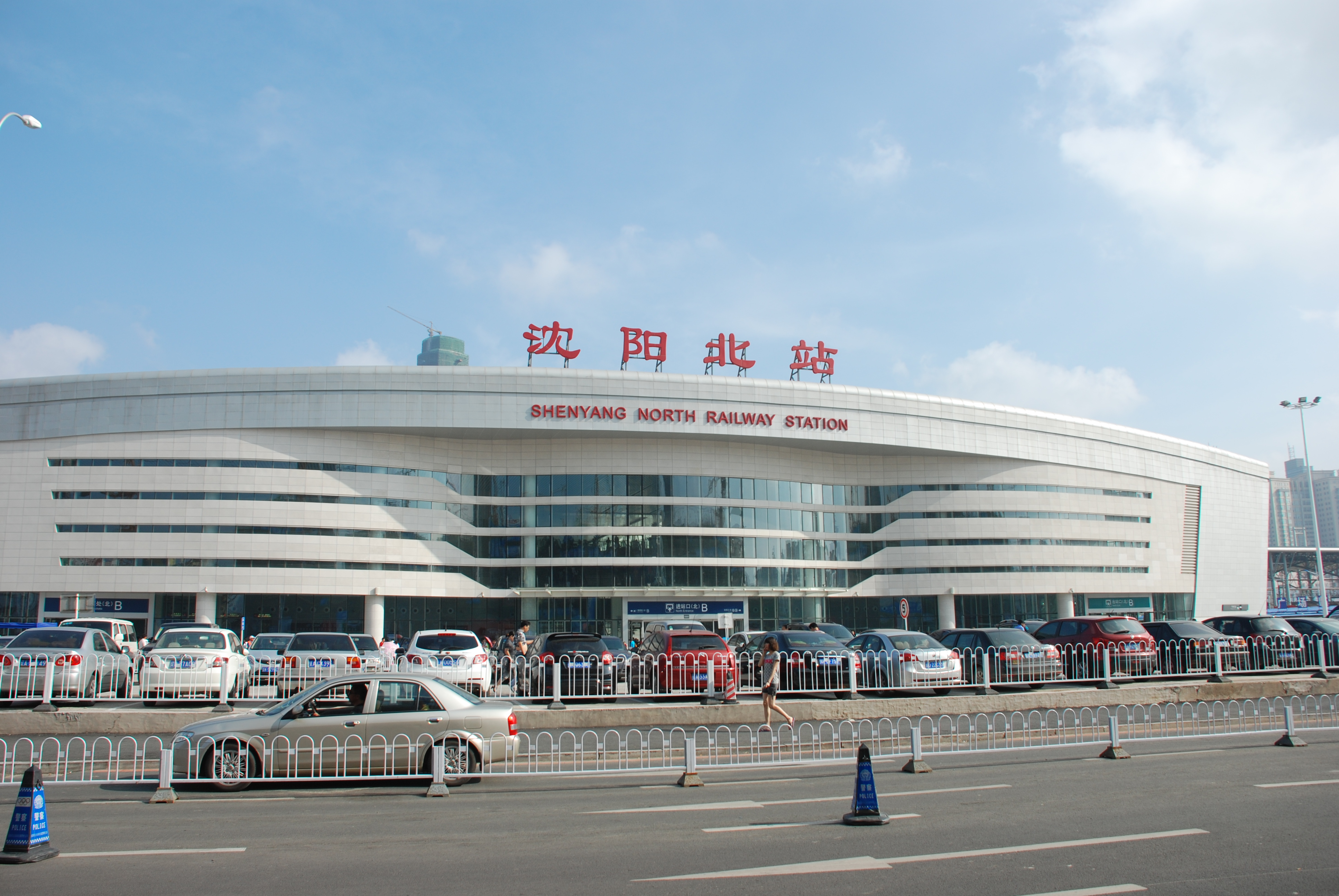 火车沈阳北站北广场